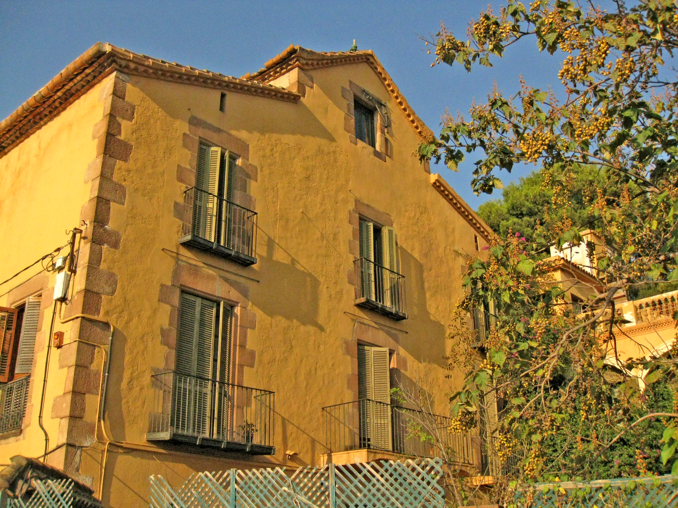 Can Mora, al carrer del Portell núm. 11-13 a la cruïlla amb el camí de Can Mora, al barri del Carmel (Barcelona). Antiga masia del 1750, tal com indica a la llinda del portal d'entrada. Té un cos afegit perpendicularment a la façana, amb arcades, que configura un pati juntament amb l'edifici principal. A la imatge, vista de la façana principal, des del camí de Can Mora.